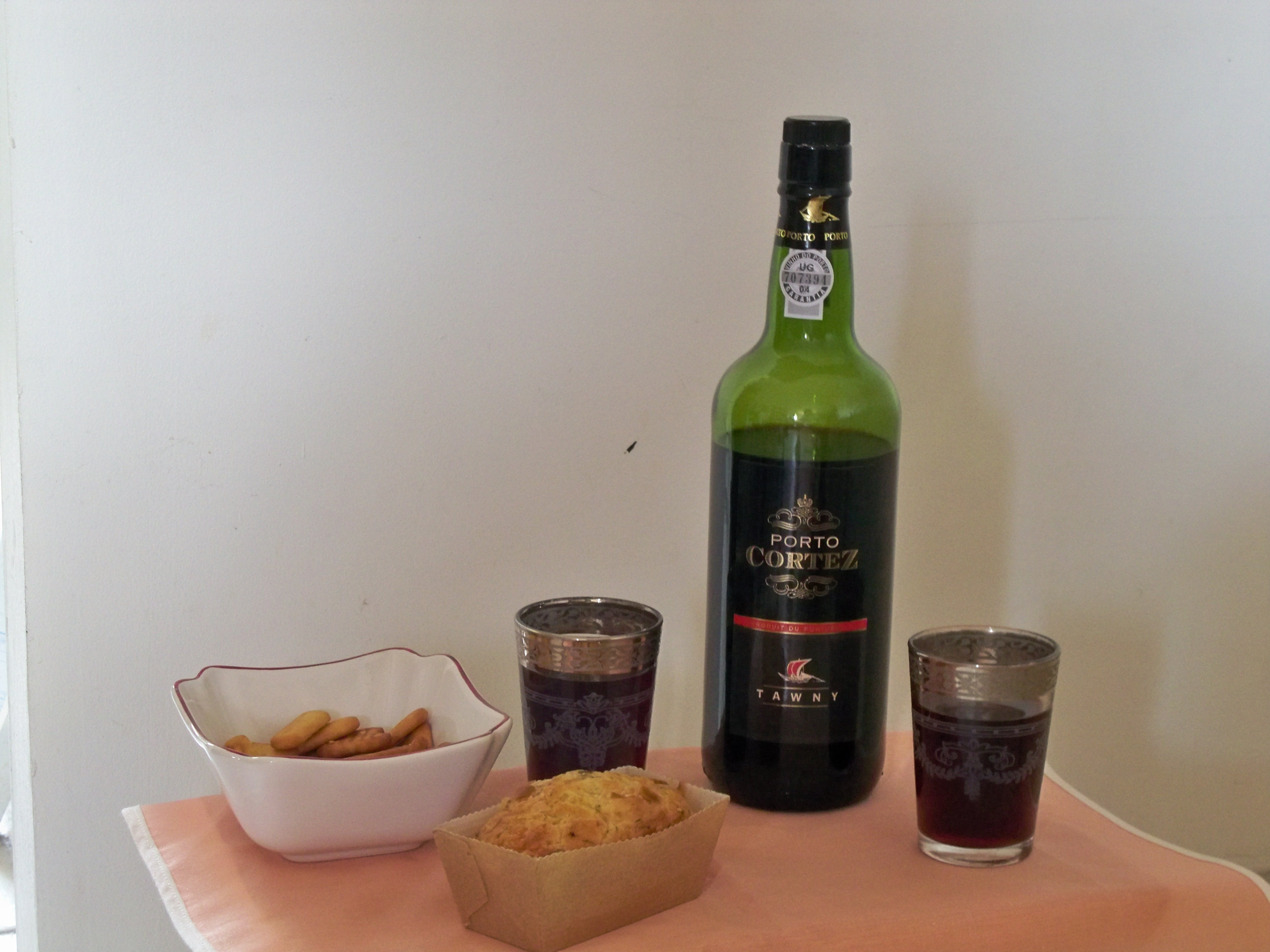 Bouteille de Porto